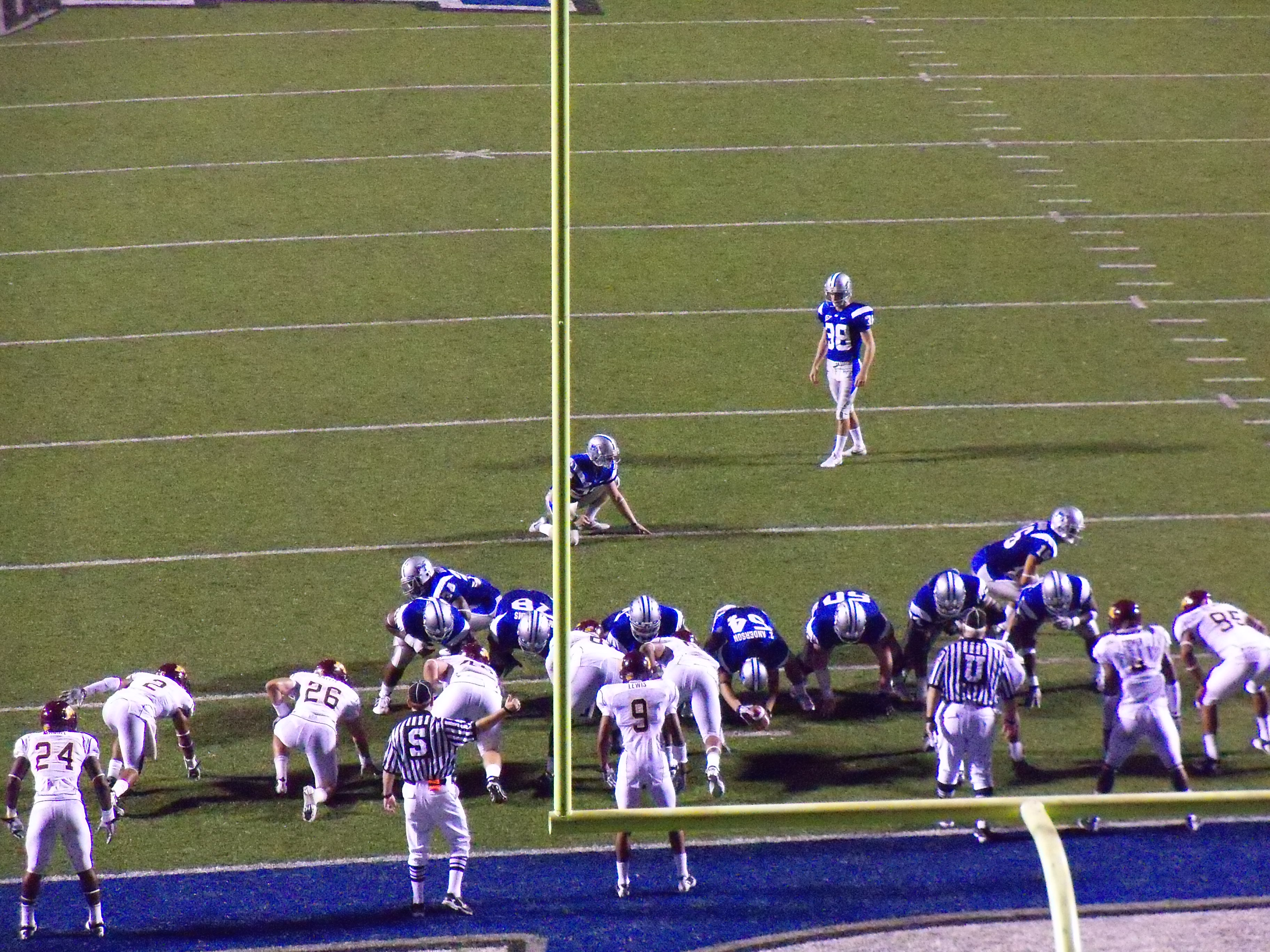 MTSU vs Minnesota, point after attempt